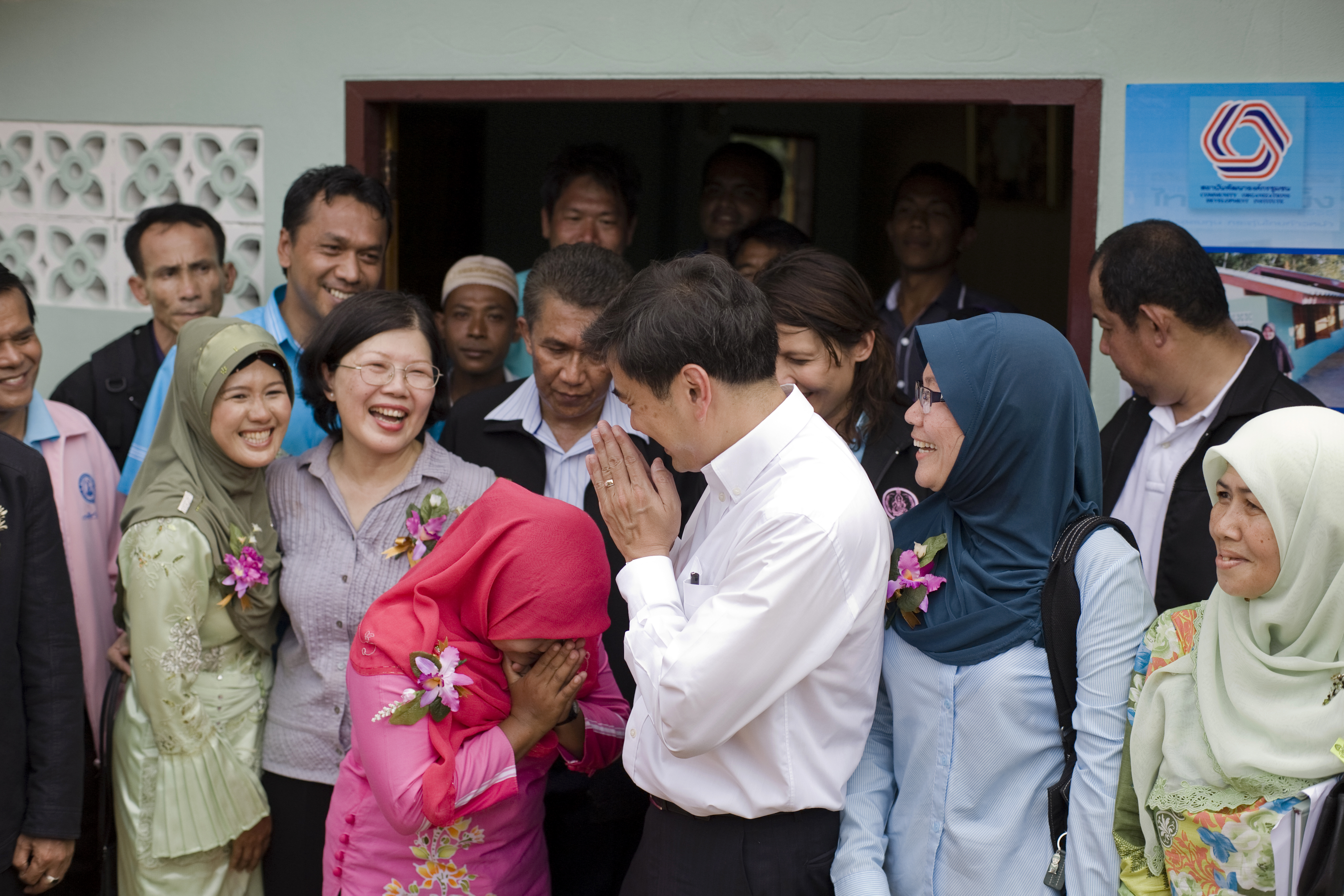 นายกรัฐมนตรี มอบบ้านตามโครงการแก้ไขปัญหาความเดือดร้อนที่อยู่อาศัย ณ บ้านตะโหนด หมู่ที่ 2 ตำบลสุวารี อำเภอรือเสาะ จังหวัดนราธิวาส วันเสาร์ ที่ 30 เมษายน พ.ศ.2554 (Photographer attached to the Prime Minister of the Kingdom of Thailand (H.E.Mr.Abhisit Vejjajiva) : Peerapat Wimolrungkarat / พีรพัฒน์ วิมลรังครัตน์) @is50mm